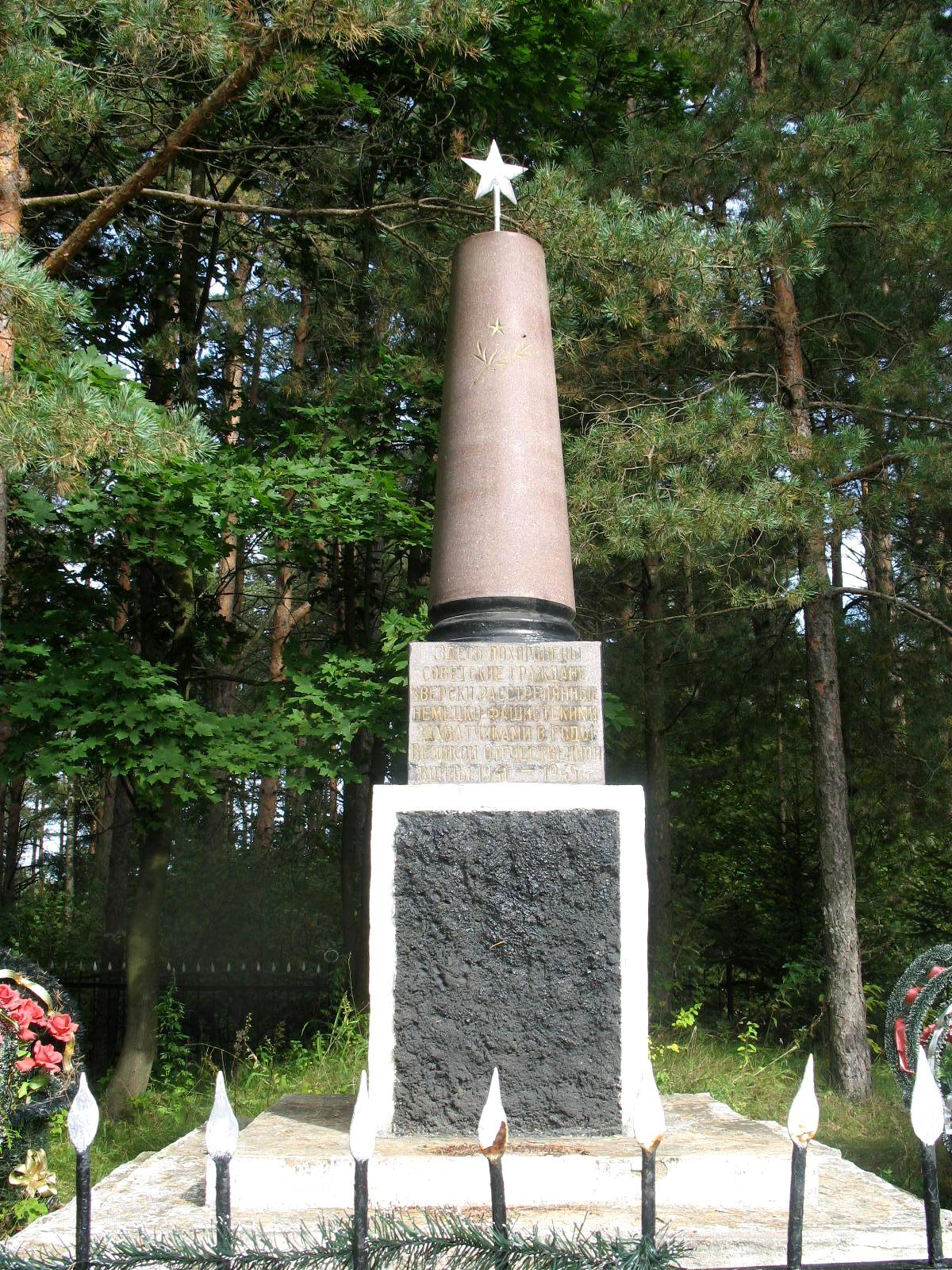 Памятник убитым нацистами евреям Логойска. Установлен в 1970-е годы.